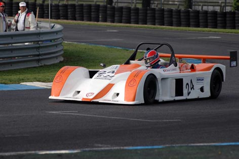 Tornade modèle ouvert